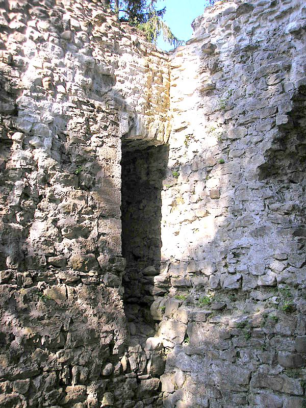 Burg Neuenburg bei Durach (Landkreis Oberallgäu, Bayerisch-Schwaben). Die Einstiegsöffnung des Bergfrieds. Eigene Aufnahme, Mai 2008 / Neuenburg castle near Durach (Landkreis Oberallgäu, Bavaria, Germany). The entrance to the keep. Own photo, May 2008